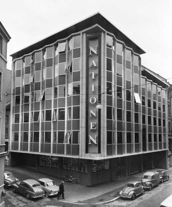 forretningsgård, Nationens avishus, biler.